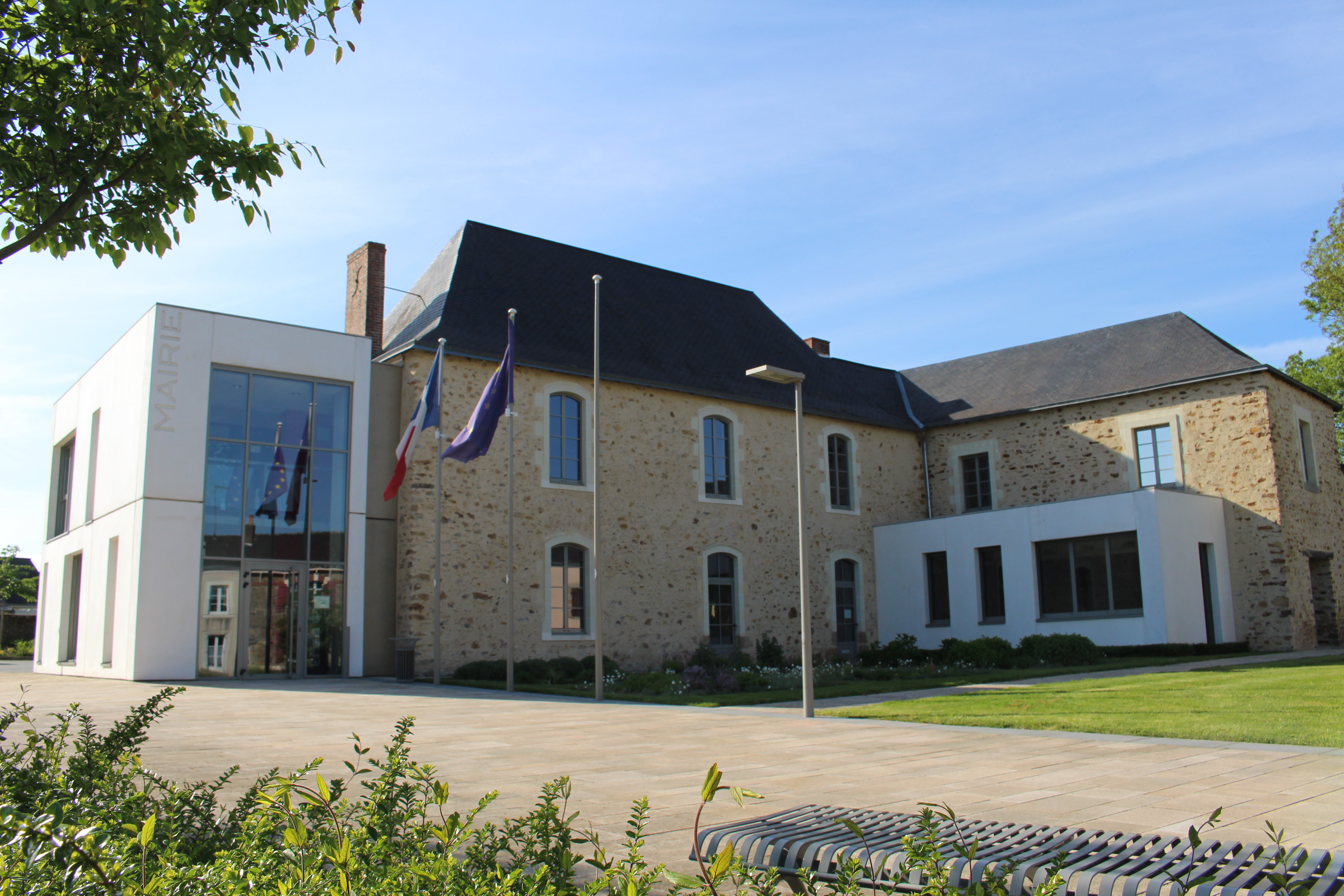 Loiron, Mayenne